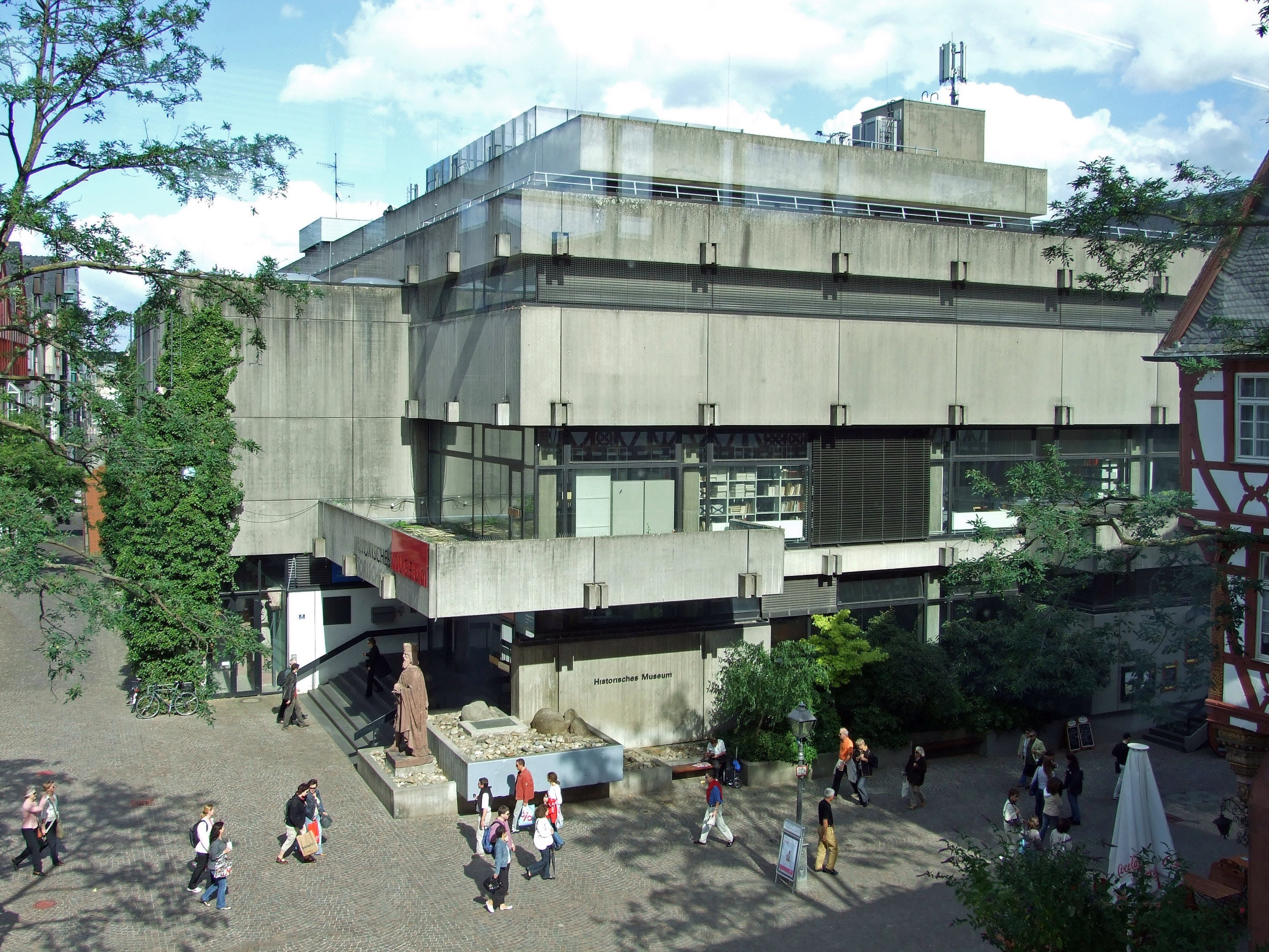 Historisches Museum auf dem Roemerberg in Ffm